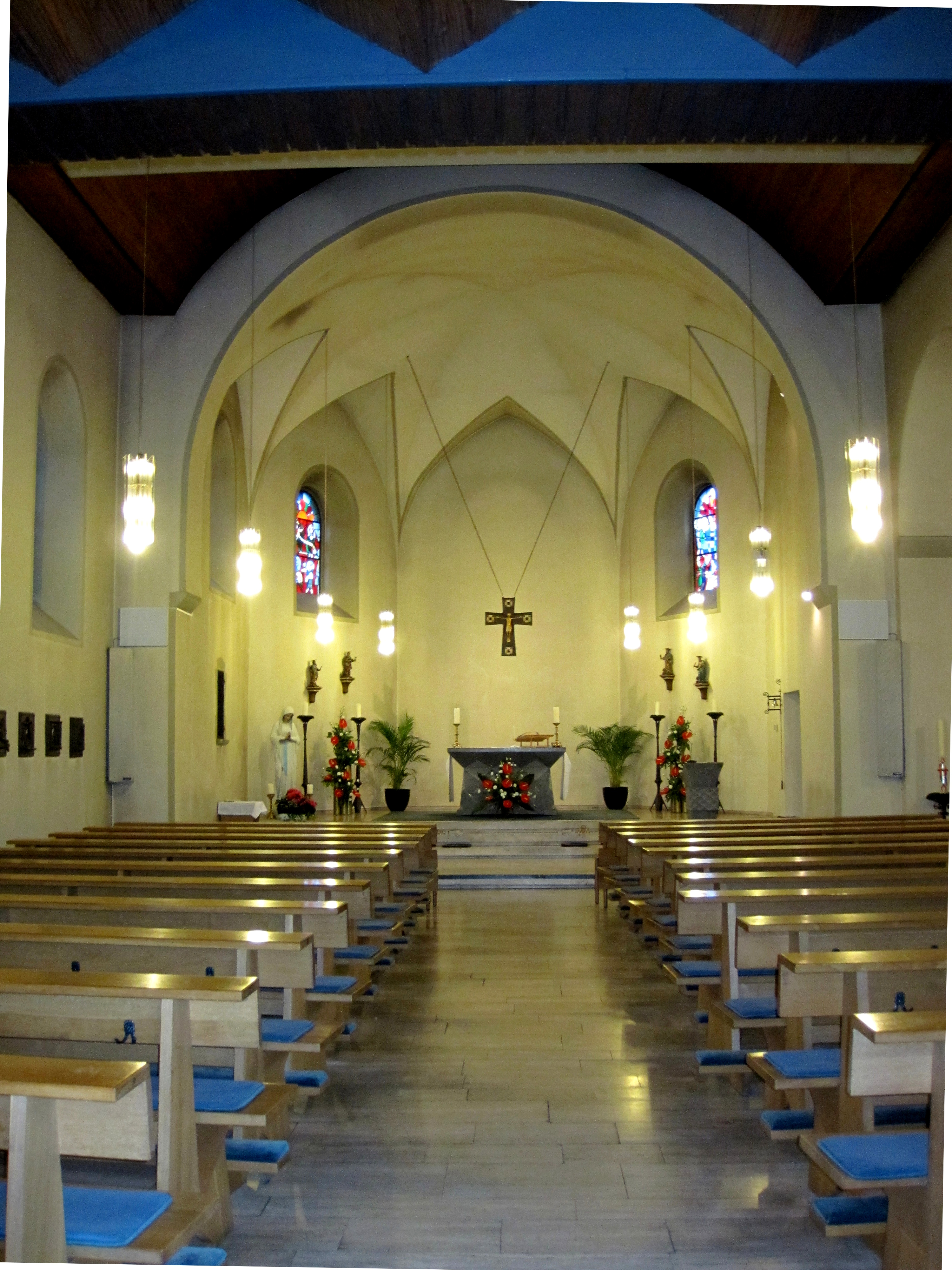 Köttingen St. Joseph Langhaus und Chor